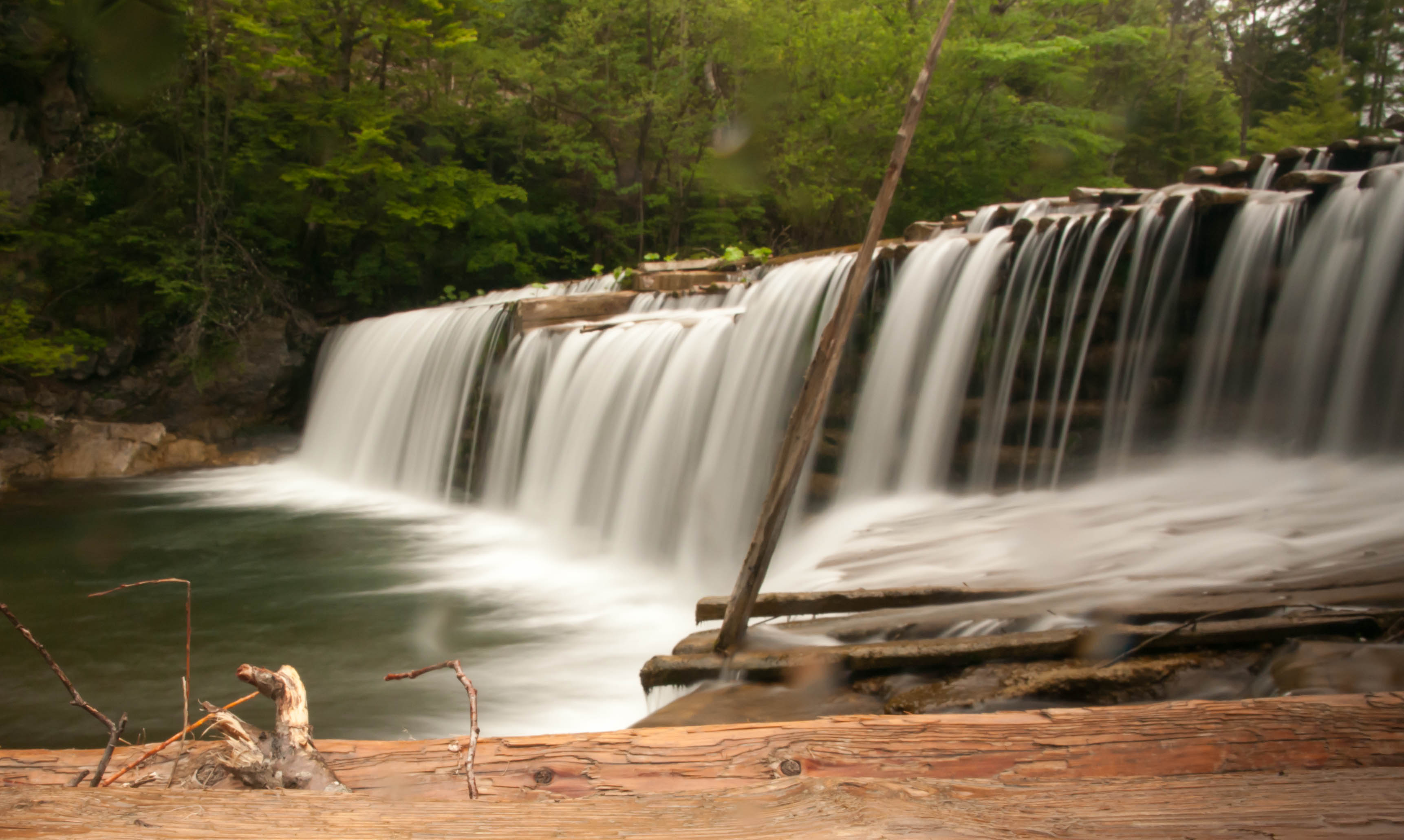 Savinja waterfall in Raduha, Slovenia